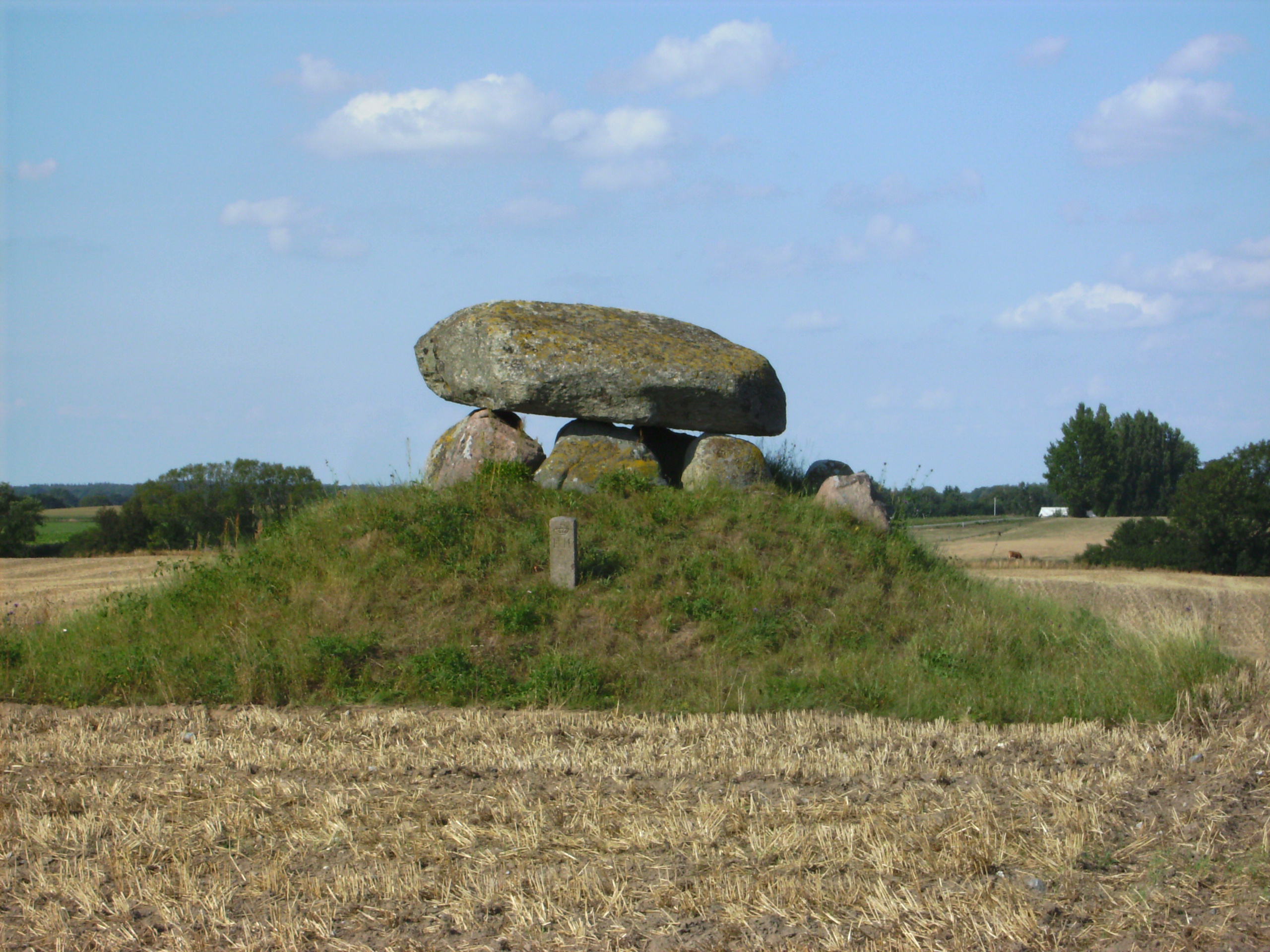 Oldtidsgrave ved Grønnegade nord for Nysted Dolmens north of Nysted, Denmark